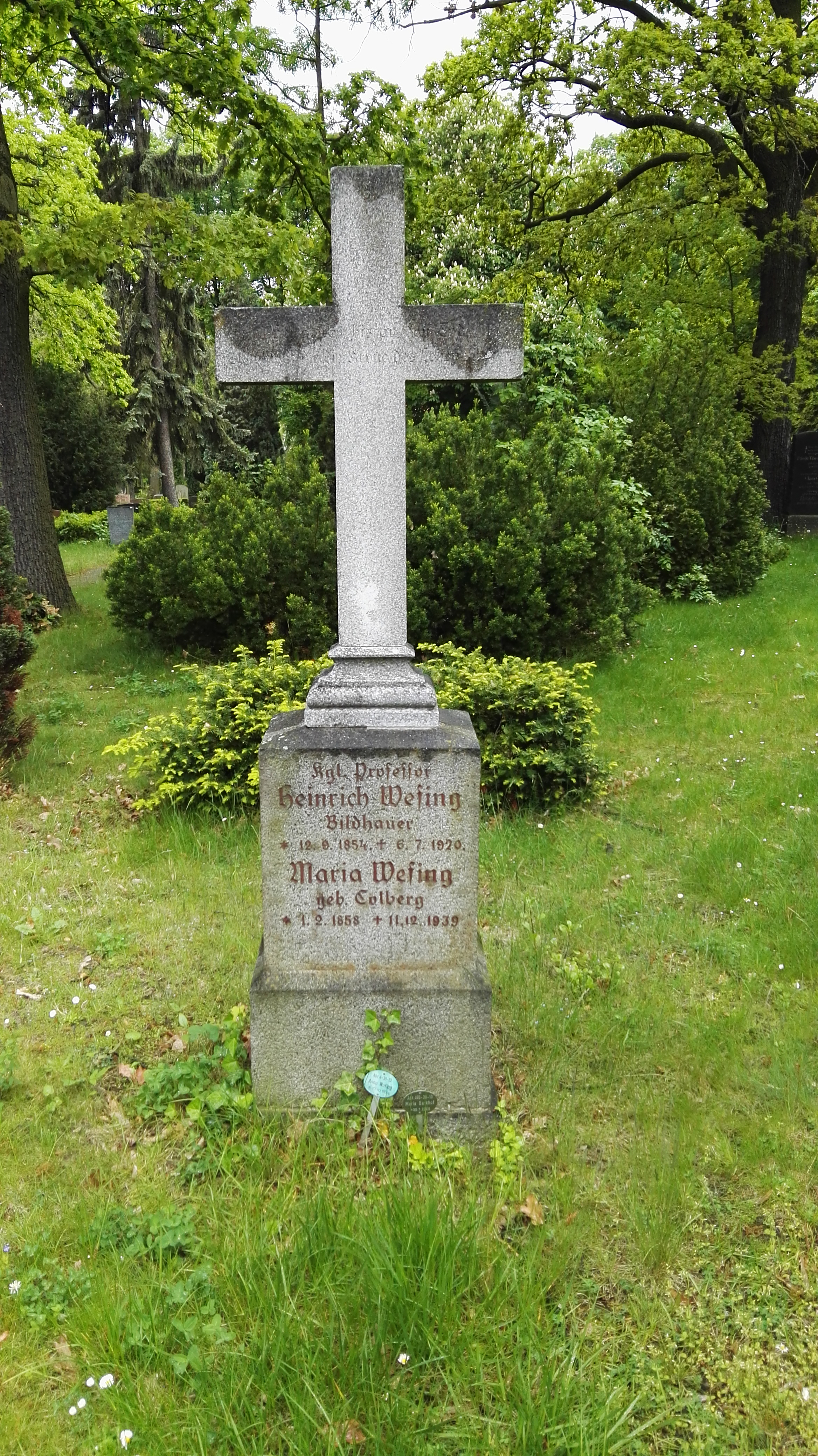 Grabstätte für den Bildhauer Prof. Heinrich Wefing auf dem Alter Friedhof der Zwölf-Apostel-Gemeinde in Berlin-Schönberg